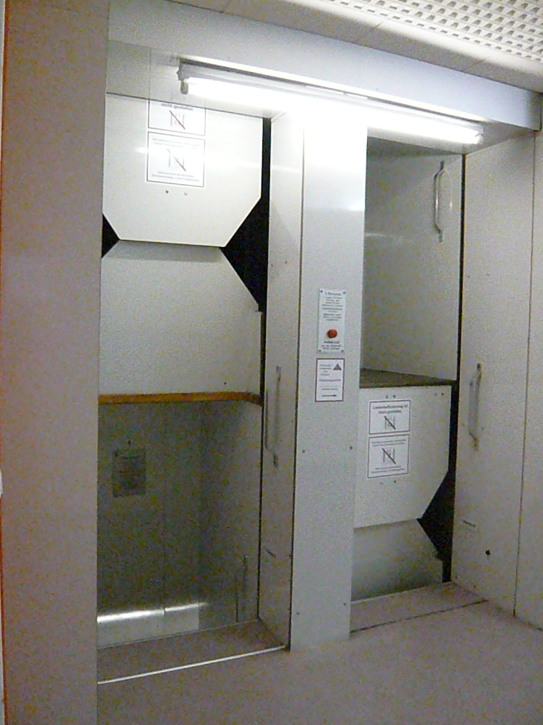 Paternoster im ND-Gebäude Fr.-Mehring-Platz